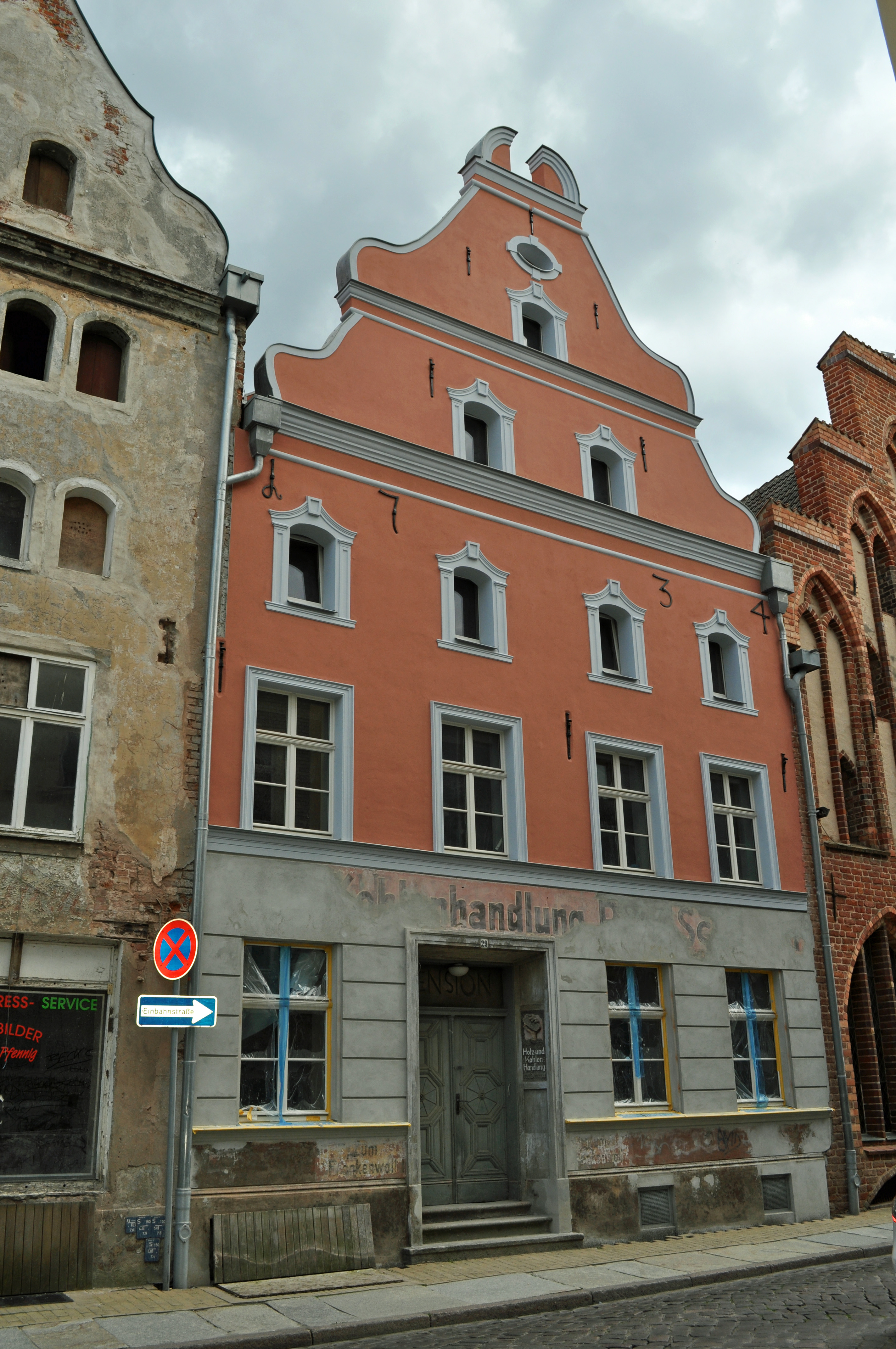 Das Foto zeigt ein Haus (bzw. Details des Hauses) in der Frankenstraße in Stralsund, Deutschland. Die Hausnummer steht im Dateinamen. Aufgenommen am 19. Juli 2011 vom Benutzer:Klugschnacker.